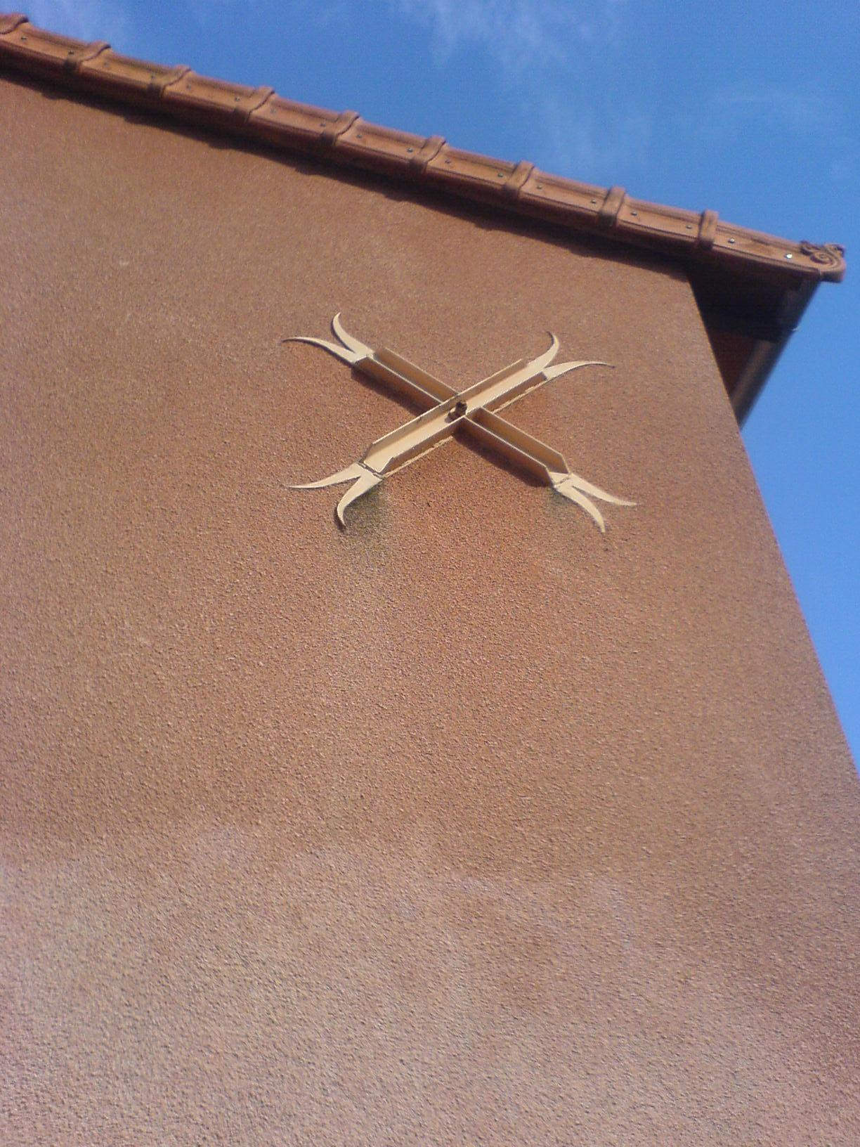 Tirant (construction)